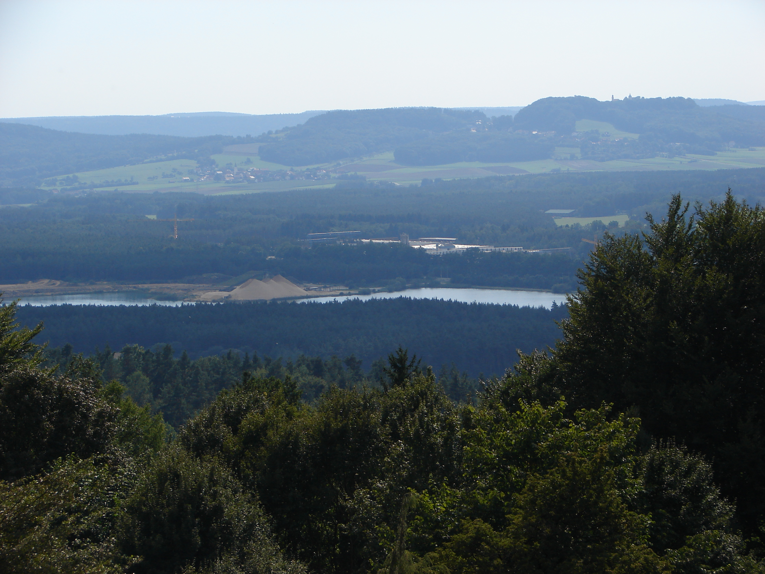 Bögelweiher/Sandabbau Anlage der Firma Max Bögel in der Nähe von Sengenthal